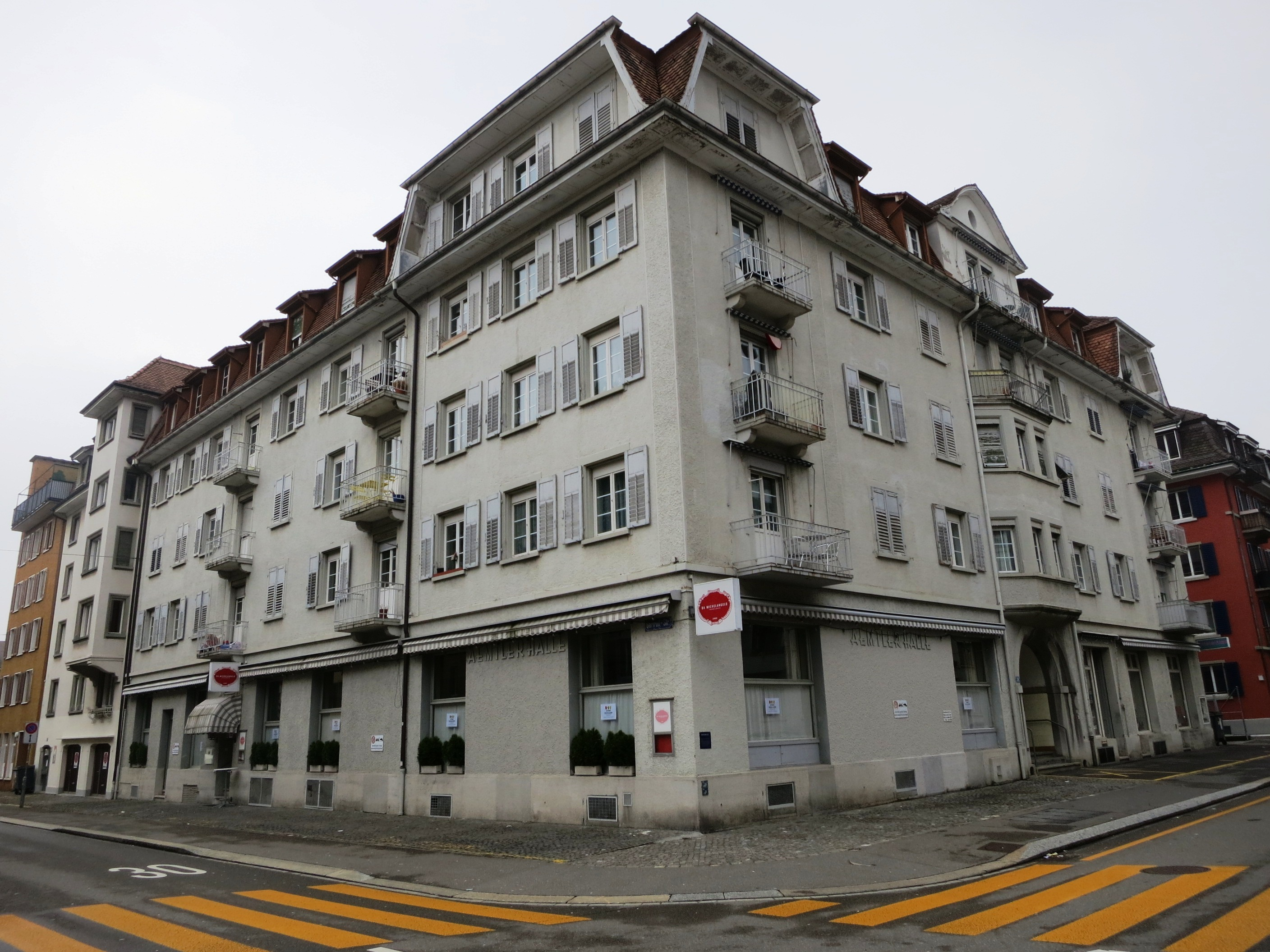 Aemtlerhalle/Amerikanerhaus, Zürich-Wiedikon, Schweiz